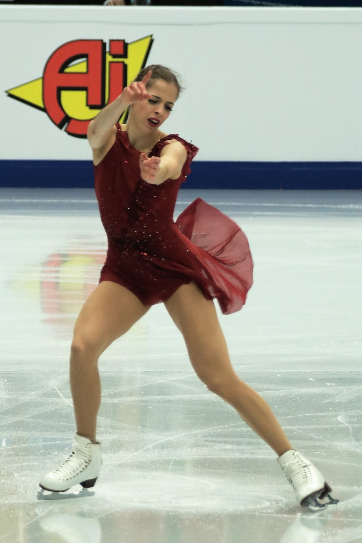 Каролина Костнер (Италия) на Чемпионате Европы по фигурному катанию 2018.